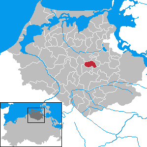 Richtenberg in Mecklenburg-Vorpommern - District Nordvorpommern